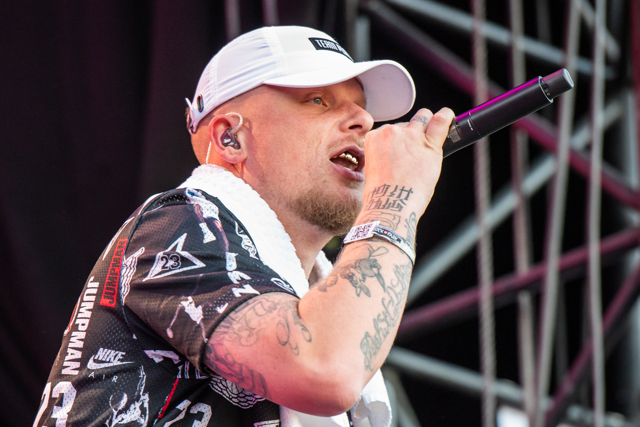 ARGO-Konzerte,Beck's Park Stage,Bonez MC & RAF Camora,Konzert,Livekonzert,Livemusik,Musik,RiP,Rock im Park 2019